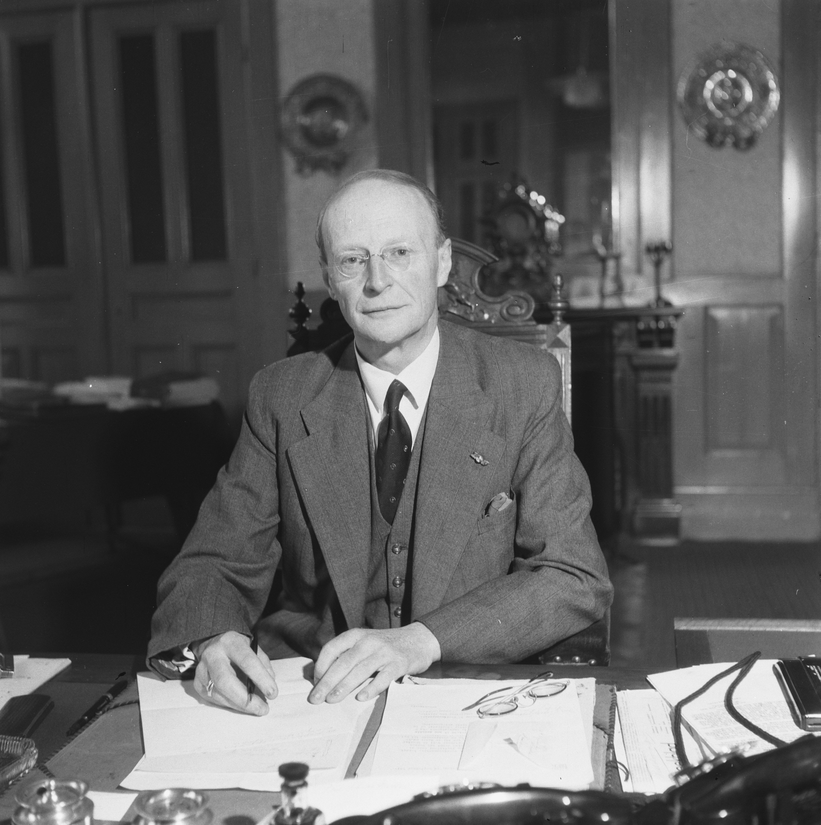 Collectie / Archief : Fotocollectie Anefo Reportage / Serie : [ onbekend ] Beschrijving : J.A. van Thiel, benoemd tot procureur-generaal van Amsterdam Datum : 1945 Trefwoorden : justitie, portretten, portretten, procureur-generaals Persoonsnaam : Thiel, J.A. van Fotograaf : Fotograaf Onbekend / Anefo Auteursrechthebbende : Nationaal Archief Materiaalsoort : Negatief (zwart/wit) Nummer archiefinventaris : bekijk toegang 2.24.01.03 Bestanddeelnummer : 900-8648